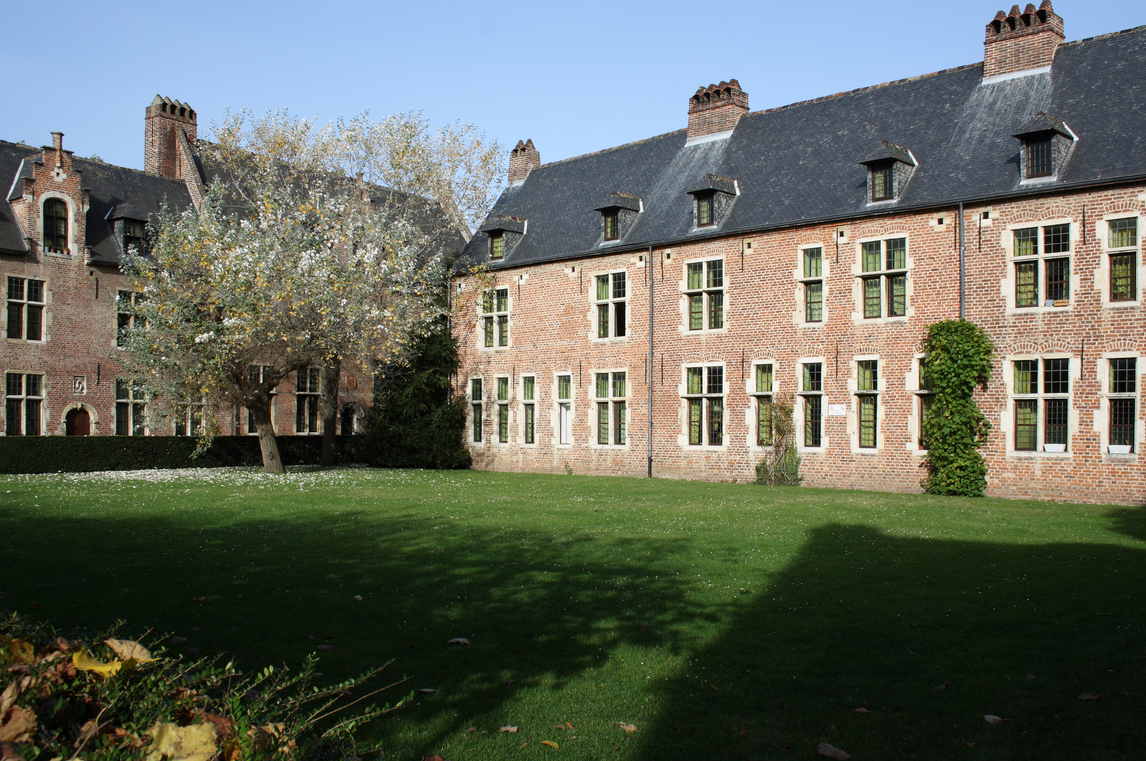 Großer Beginenhof in Löwen in der Provinz Flämisch-Brabant (Belgien)